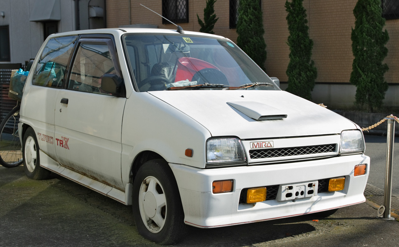 Daihatsu Mira 550 Tutbo TR-XX ( L70S )